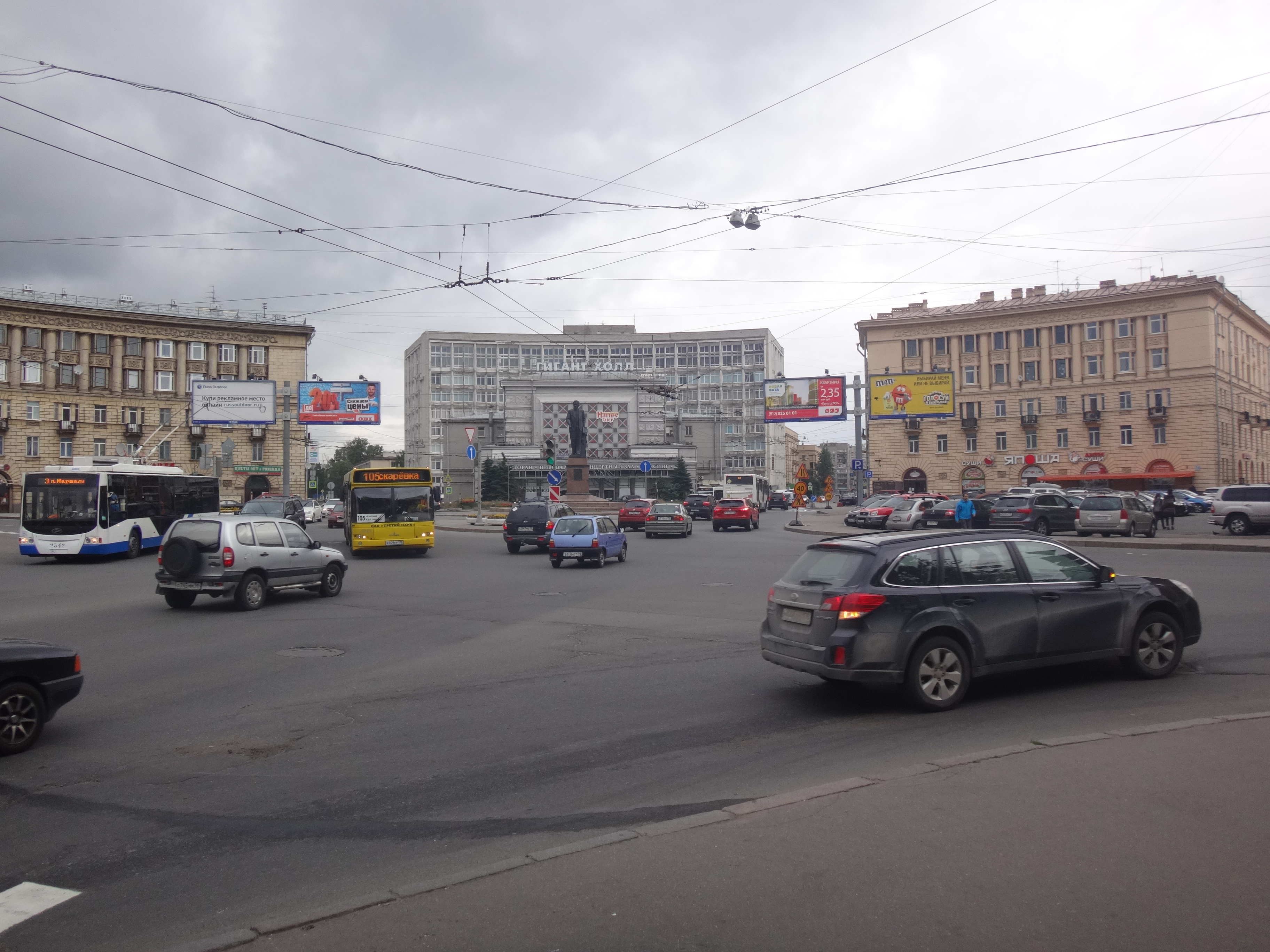 Площадь Калинина (Питер)